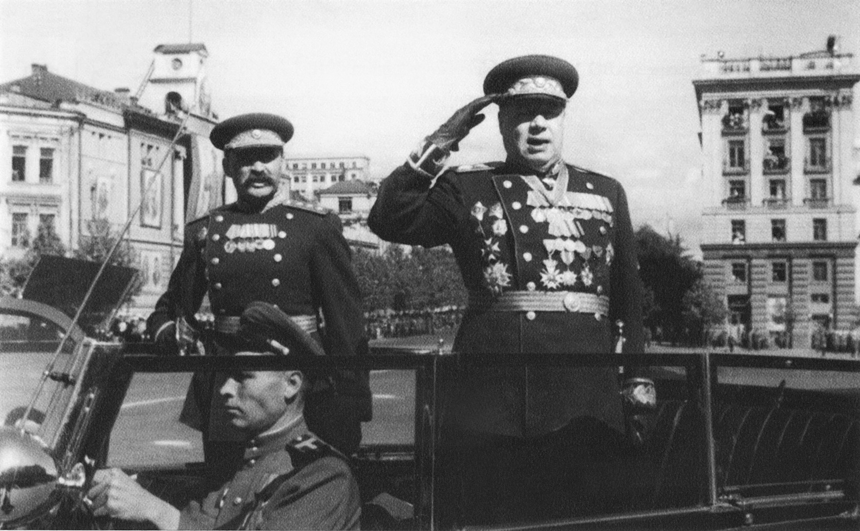 Маршал Советского Союза Ф.И. Толбухин принимает военный парад